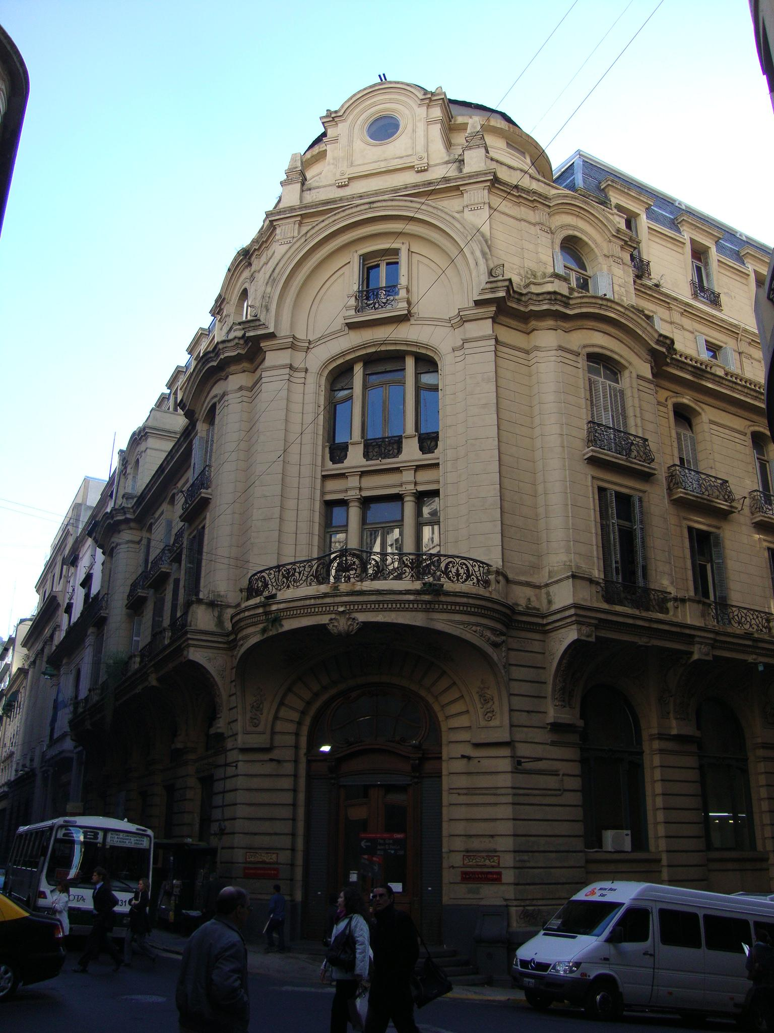 Vista desde la esquina de las calles 25 de Mayo y Juan D. Perón del edificio construido para el empresario naviero Nicolás Mihanovich como "Palace Hotel". Luego sede del Banco Hipotecario, actualmente sede de la Facultad de Filosofía y Letras de la Universidad de Buenos Aires. Arquitecto: Carlo Morra. 25 de Mayo 221. Buenos Aires, Argentina.